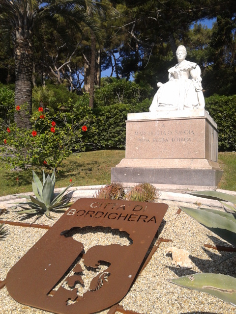 Monument dédié à la Reine Marguerite